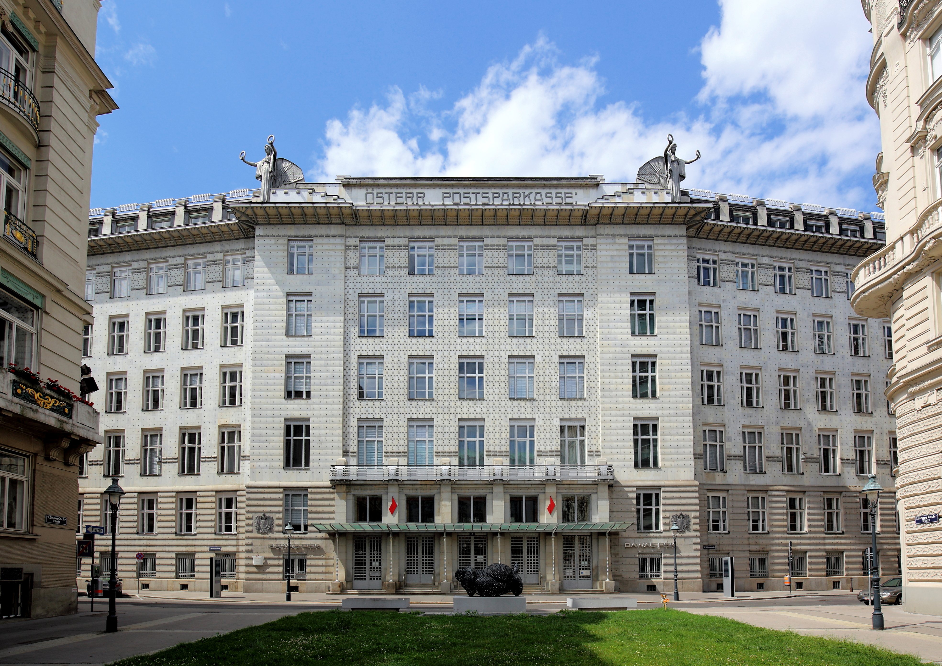 Hauptfassade des Postsparkassengebäudes in der österreichischen Bundeshauptstadt Wien. Das Gebäude wurde nach Plänen von Otto Wagner in den Jahren 1903/4 bis 1906/7 errichtet und ist eines der berühmtesten Jugendstilgebäude Wiens. Von 1910 bis 1912 erfolgte eine Erweiterung. Davor die Bronzeguss-Skulptur "Ferryman 1997" von Tony Cragg.